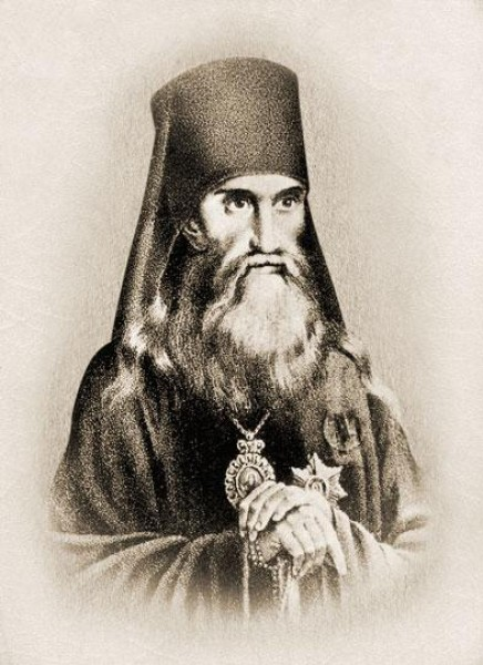 Архиепископ Иаков (в миру Иосиф Иванович Вечерков; 4 (15) апреля 1792 — 20 мая (1 июня) 1850) — епископ Русской православной церкви, архиепископ Нижегородский и Арзамасский.